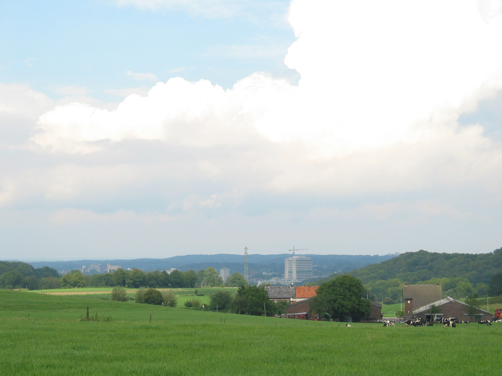 Heerlen duidelijk liggend in een dal gezien vanaf Vrouweheide.